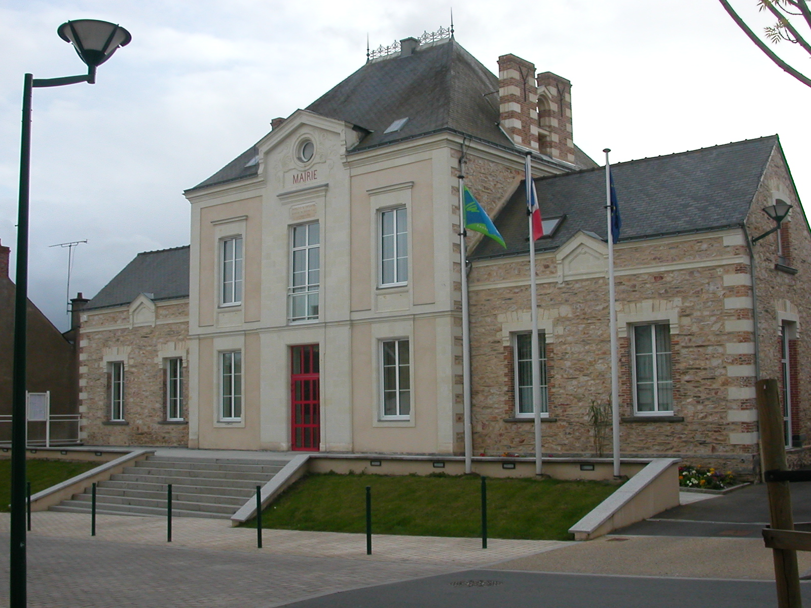 mairie de Derval